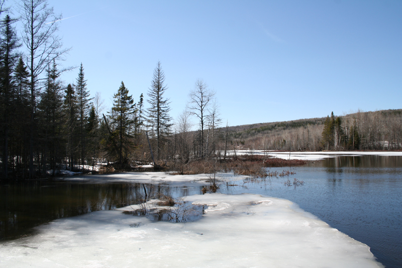 Paysage de la Municipalité de Sainte-Rita, Québec